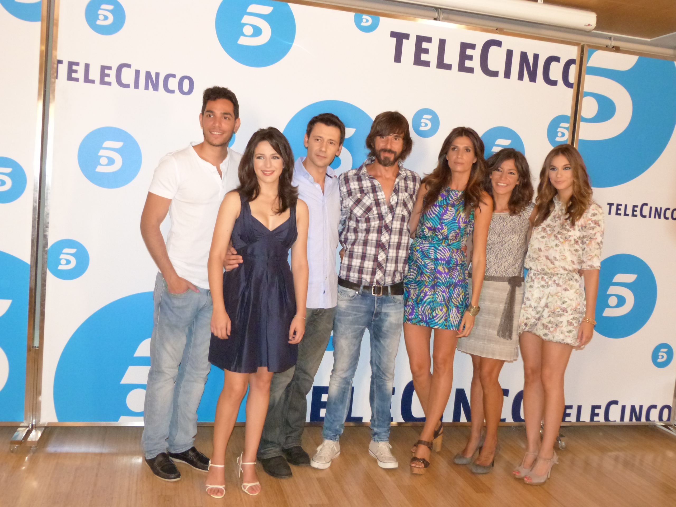 Rueda de prensa serie Frágiles Telecinco